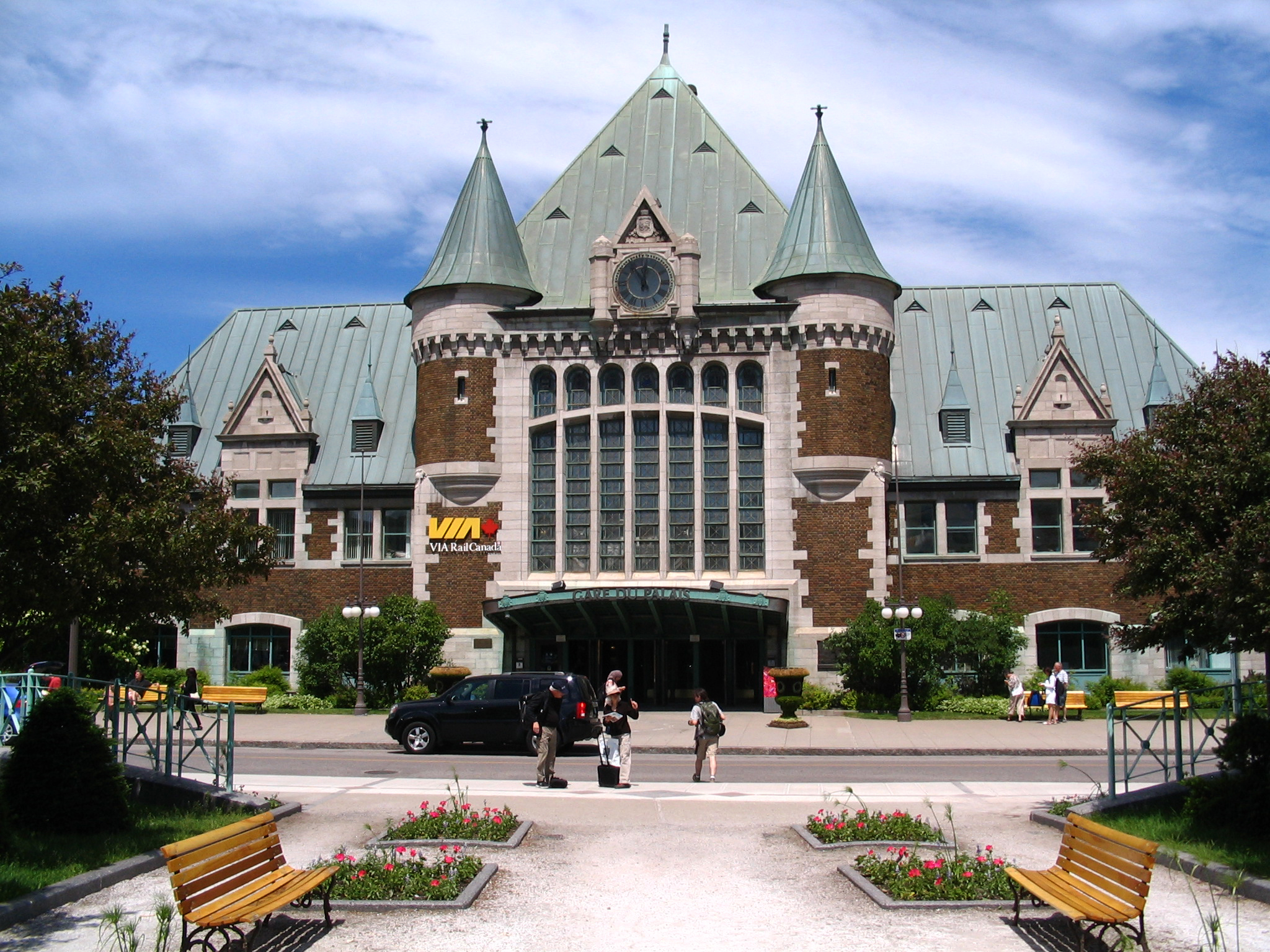 Devanture de la Gare du Palais, à Québec.